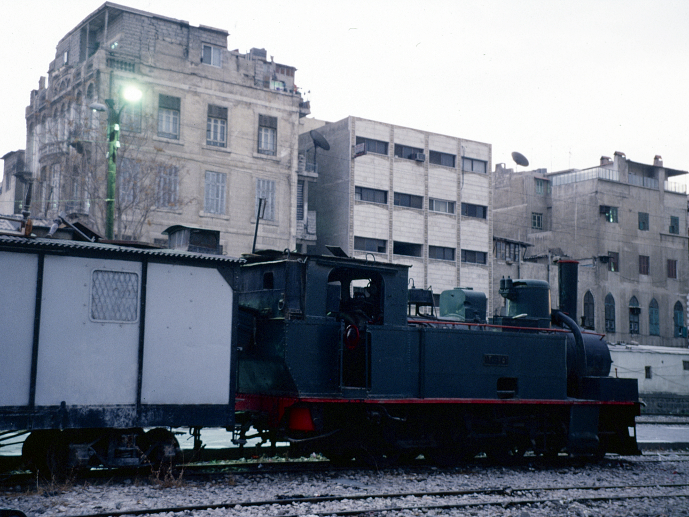 Abgestellte Zuggarnitur im Hedschasbahnhof Damaskus, aufgenommen im März 1995.